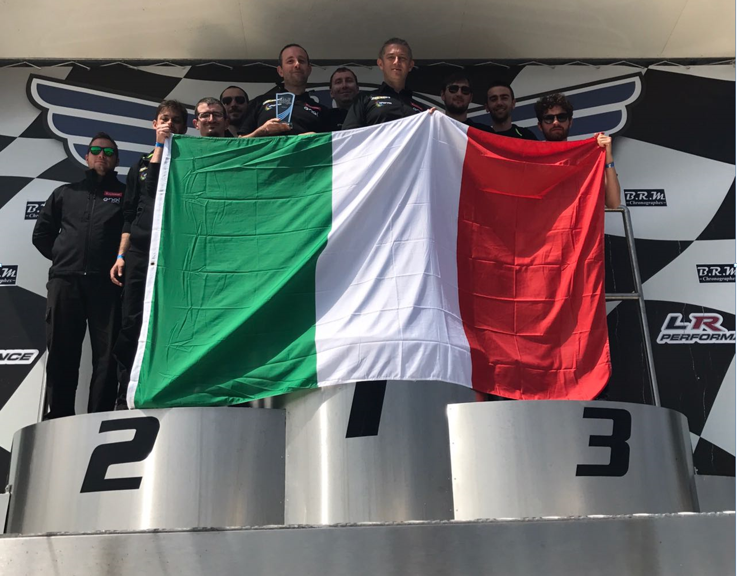 Premiazione Eco Albi Solar Race 2017